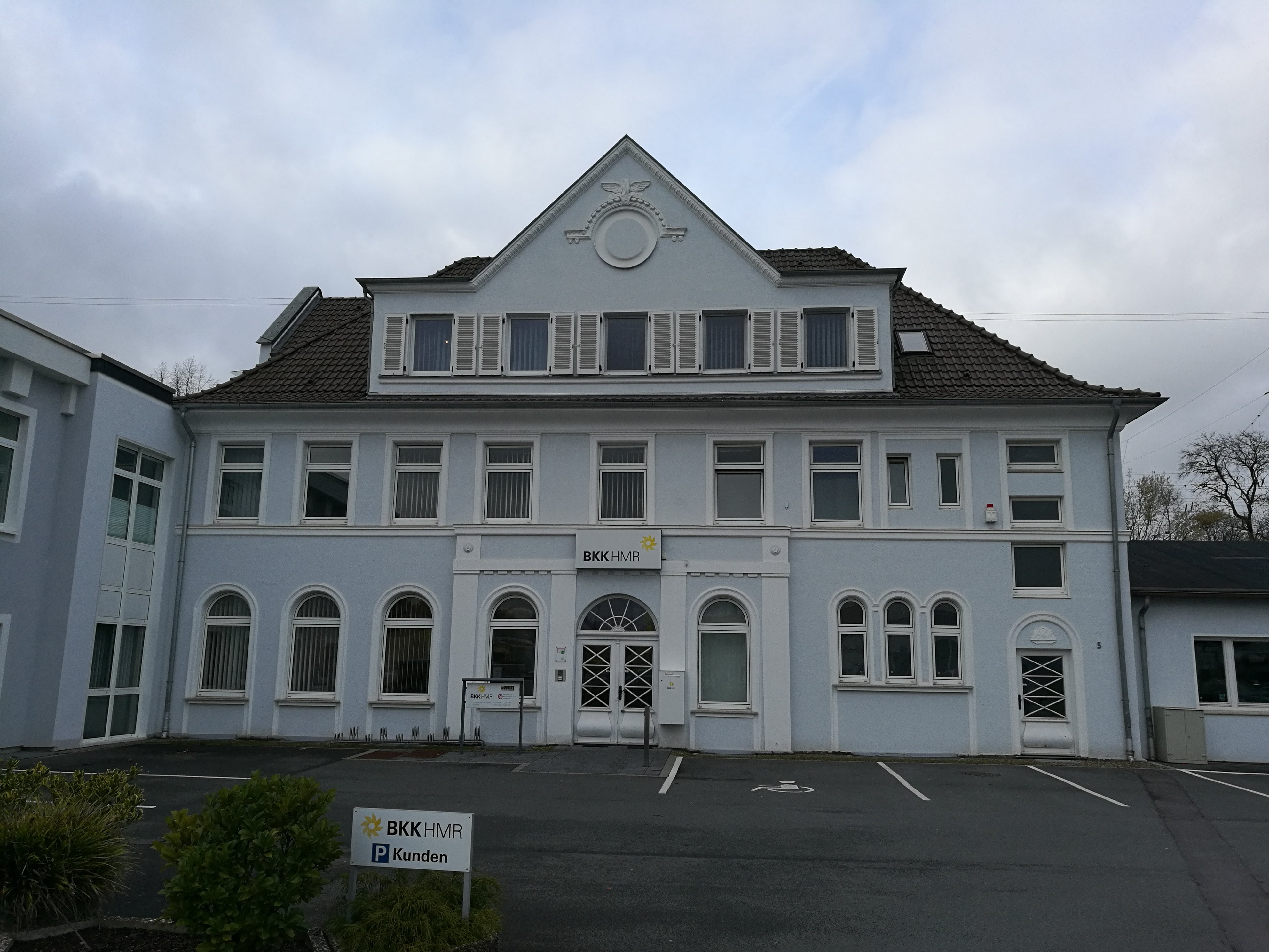 Betriebskrankenkasse Herford Minden Ravensberg Verwaltungsgebäude